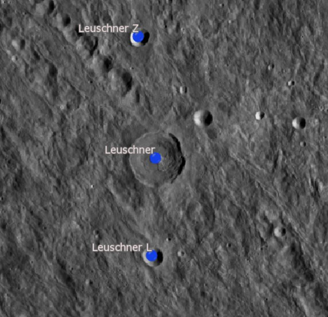 Cráter lunar Leuschner. Cráteres satélite. (Imagen LRO)